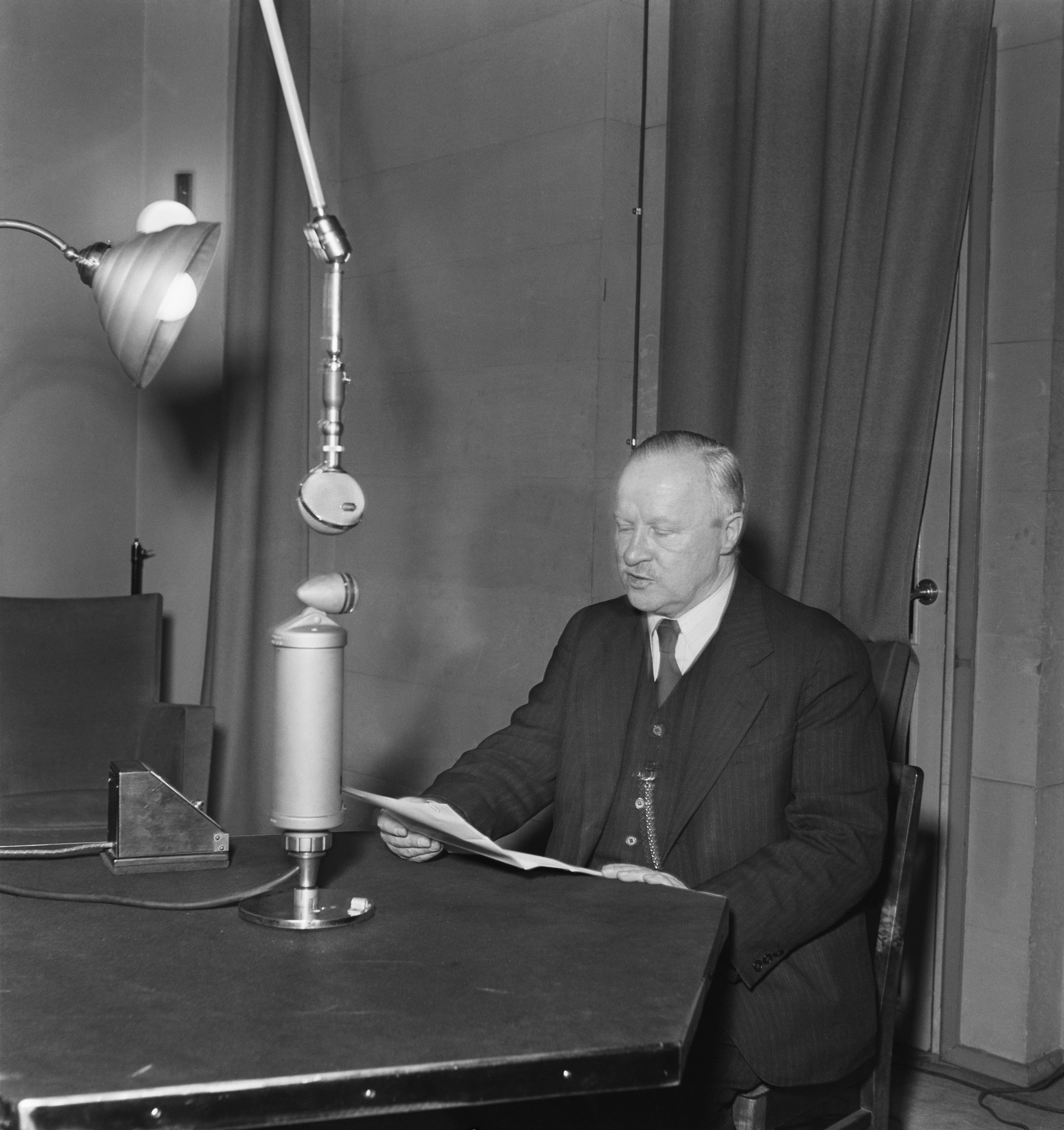 Ulkoministeri Väinö Tanner radion studiossa pitämässä radiopuhetta, jossa hän välitti tiedon talvisodan päättäneestä Suomen ja Neuvostoliiton välisestä rauhansopimuksesta (Moskovan rauha) 1940. Tiedätkö jotain tästä kuvasta? Jätä kommentti tai ota yhteyttä sähköpostitse: Tutustu Ylen arkistosisältöihin: Fler skatter från Yles arkiv: More about Yle, the Finnish Broadcasting Company